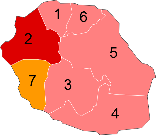 Résultats des élections législatives de La Réunion en 2012